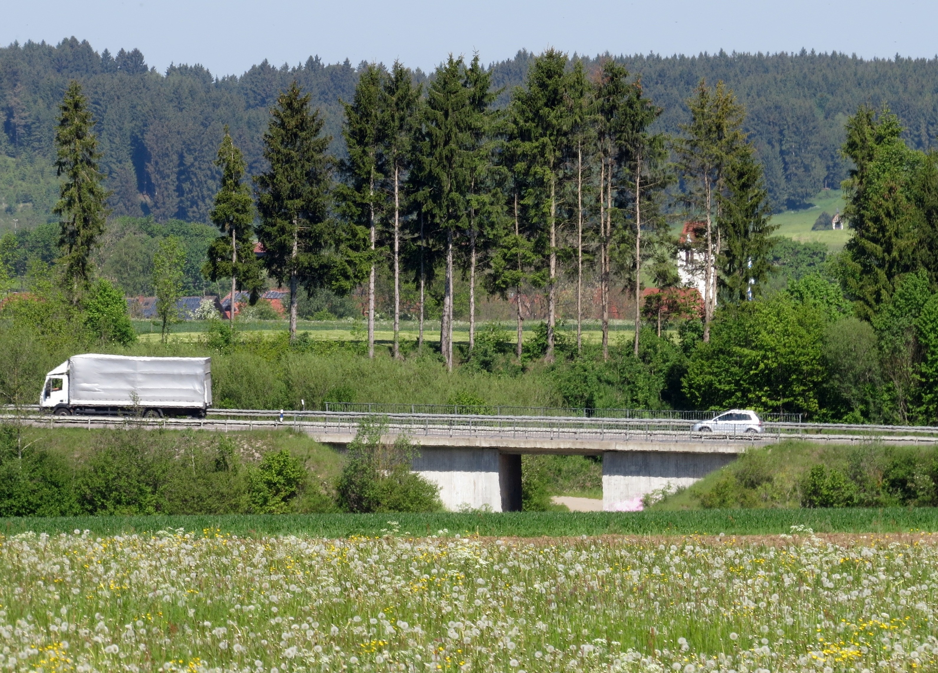 Unterführung eines Feldweges unter der Umgehungsstraße Schongau–Peiting (Bundesstraße 17) nordwestlich Schongau